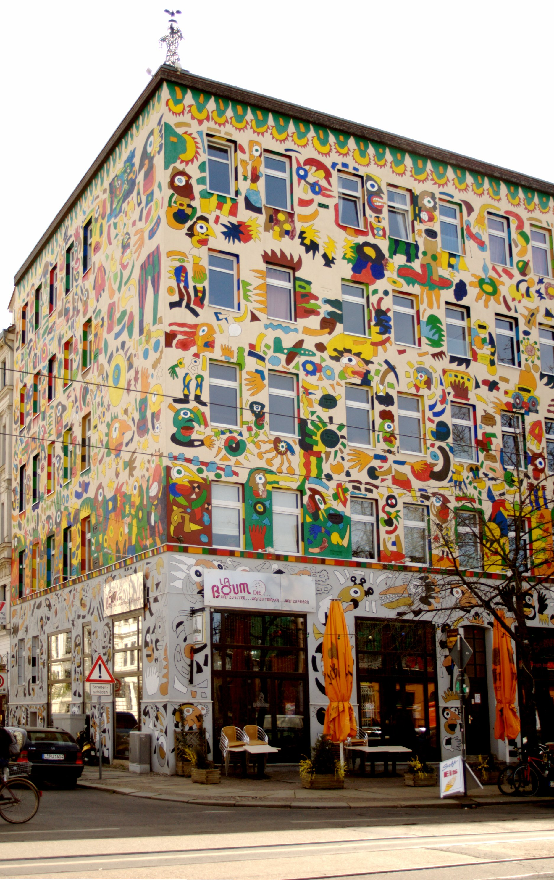 Haus mit Bemalung von Michael Fischer-Art